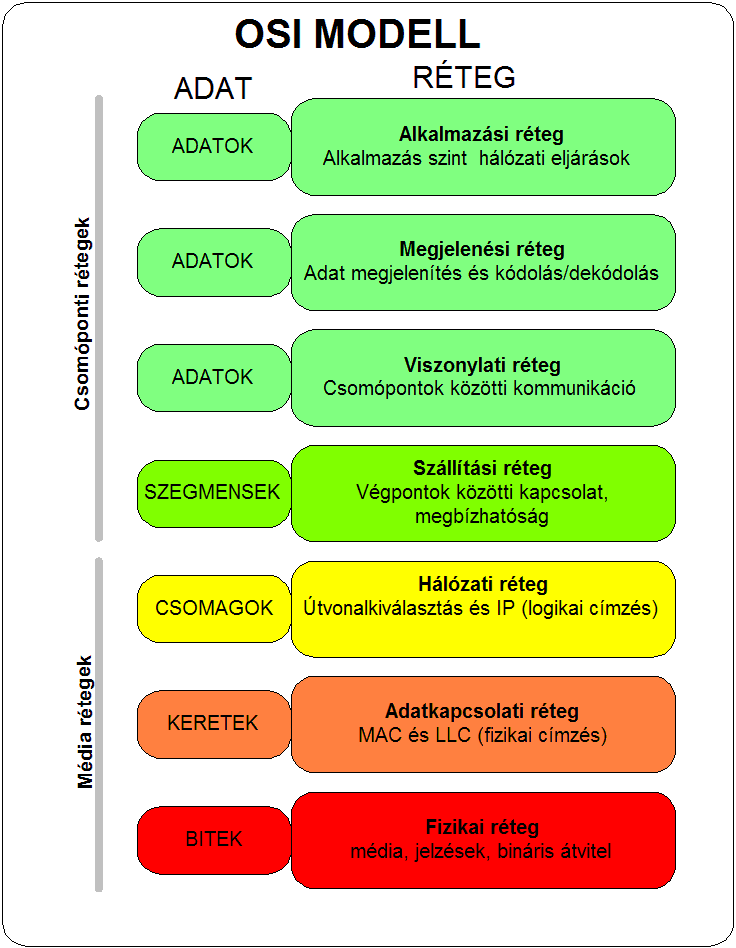 Az OSI rétegek és adataik